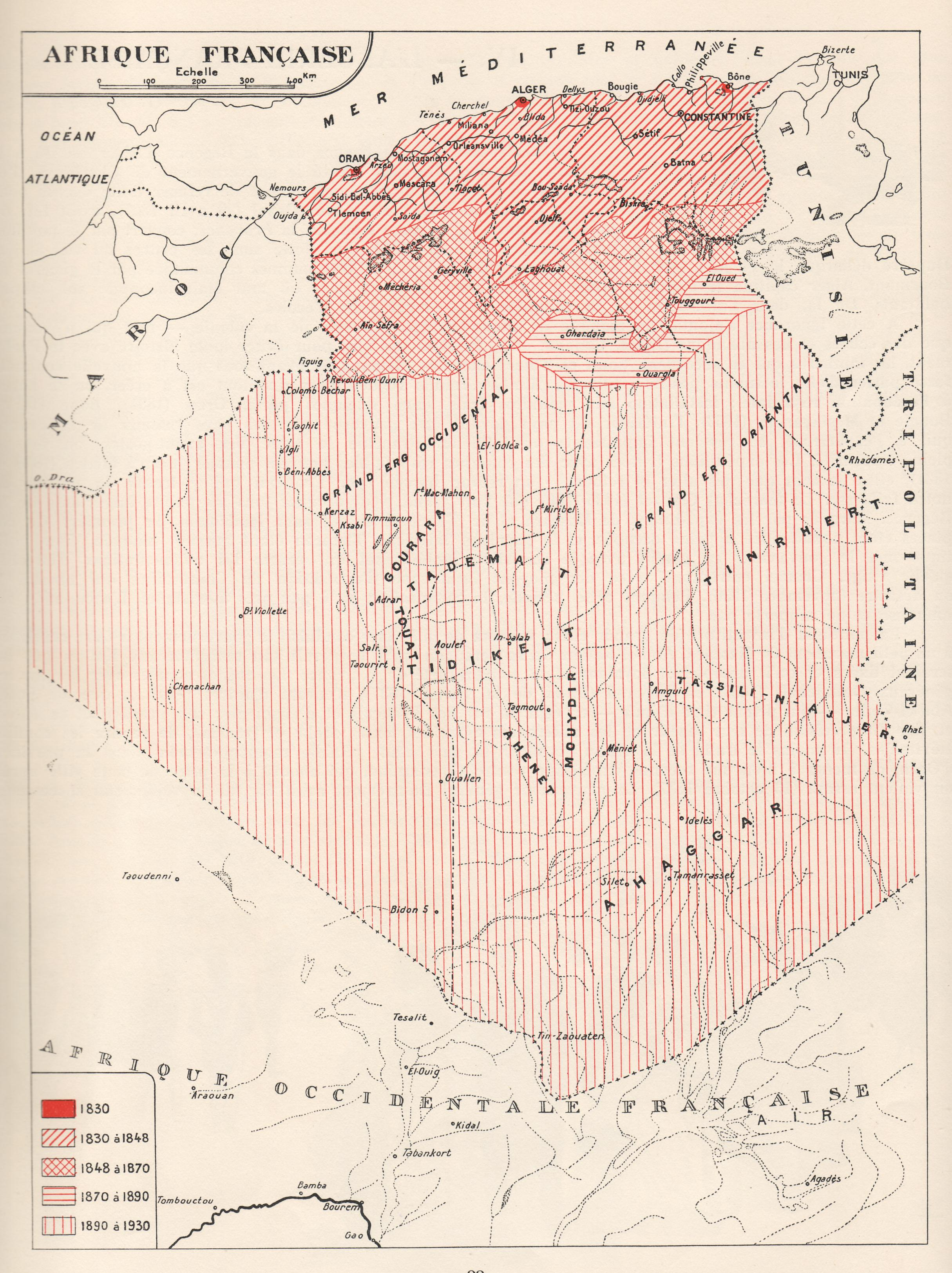 Carte chronologique de la constitution territoriale de l'Algérie française.